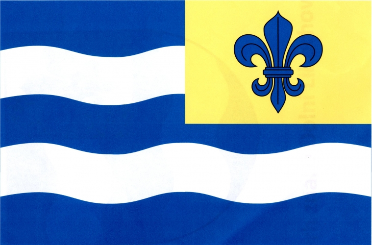 vlajka,Dolní Libochová , okres Žďár nad Sázavou